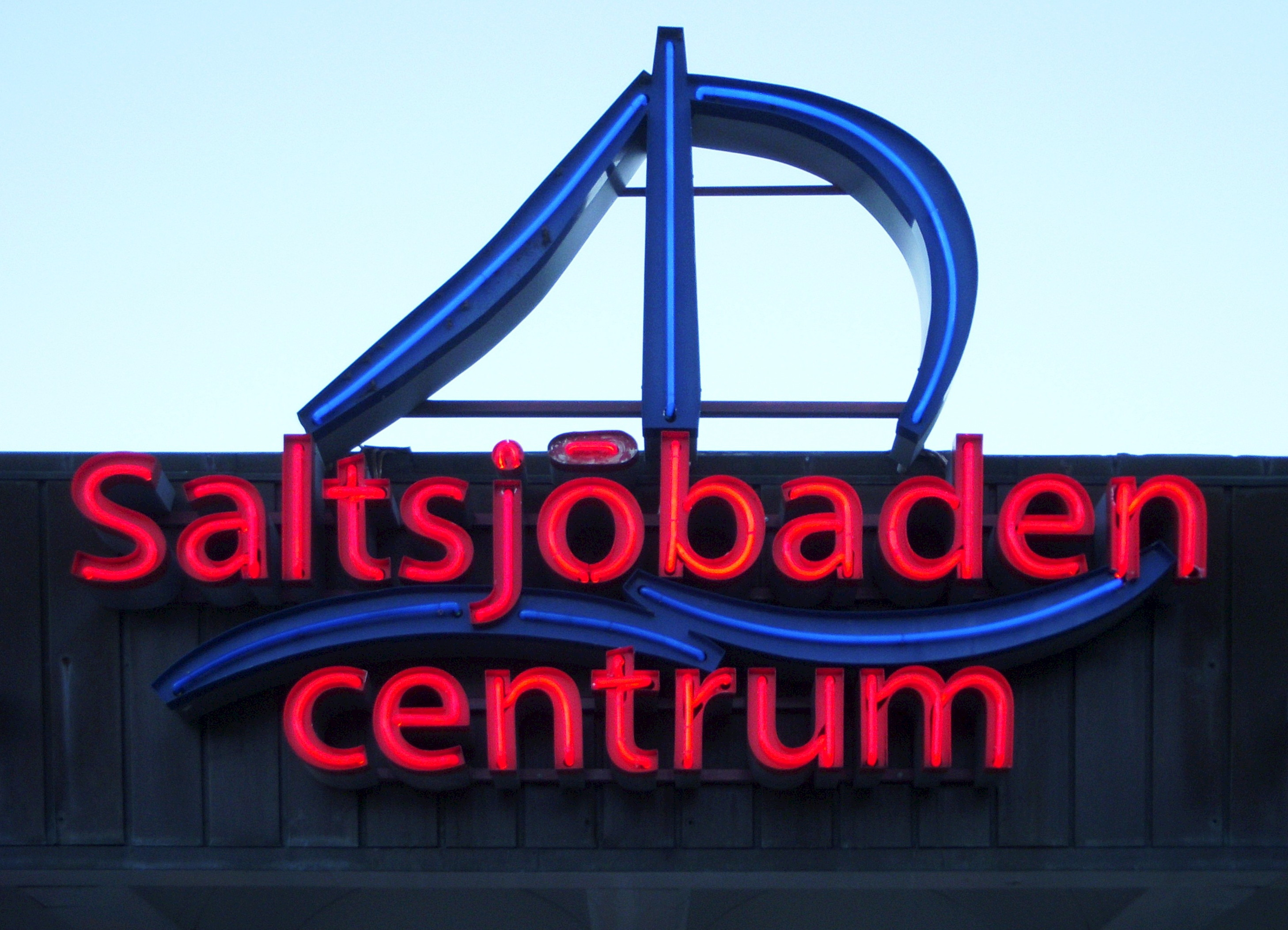 Saltsjöbaden centrum (tidigare "Tippen"), arkitekt Karl-Axel Bladh.